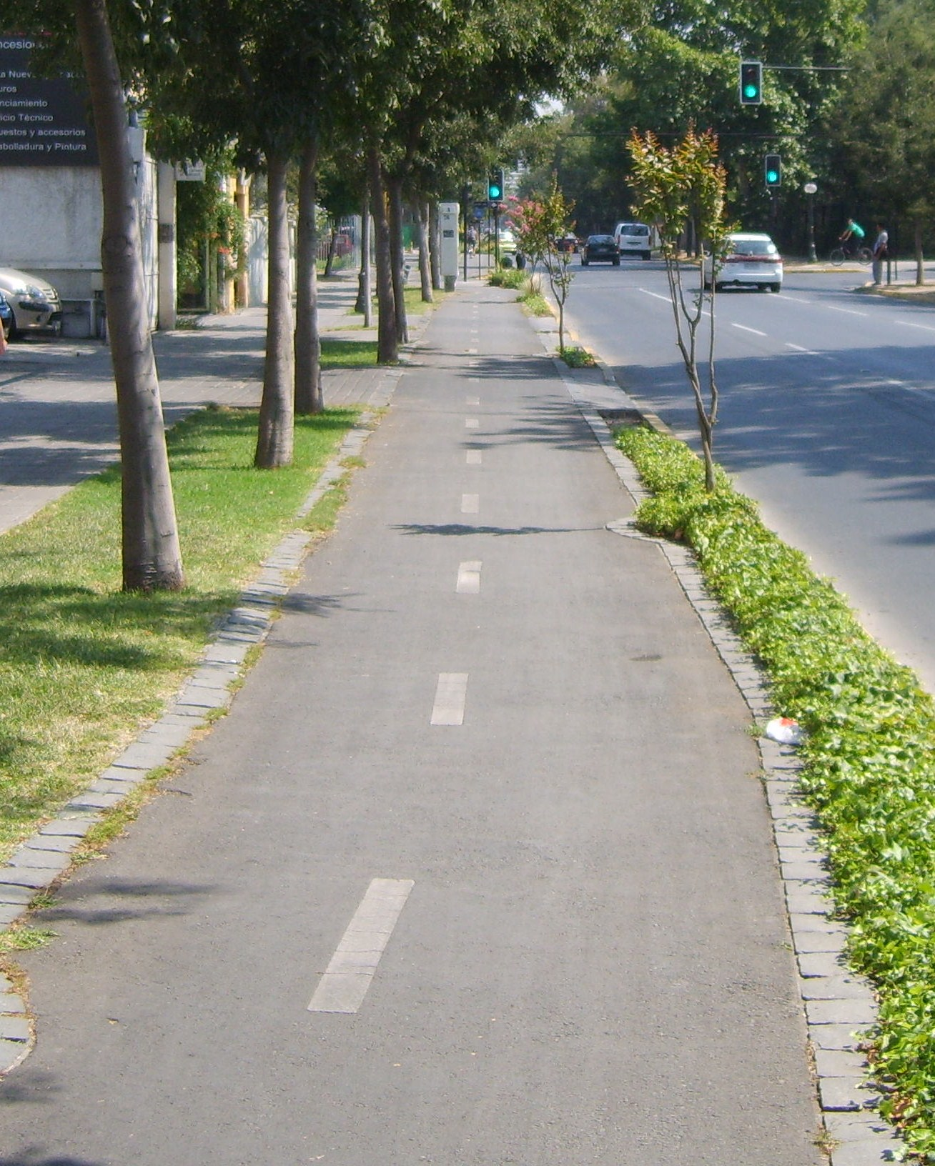 Ciclovía Antonio Varas, Providencia, Chile